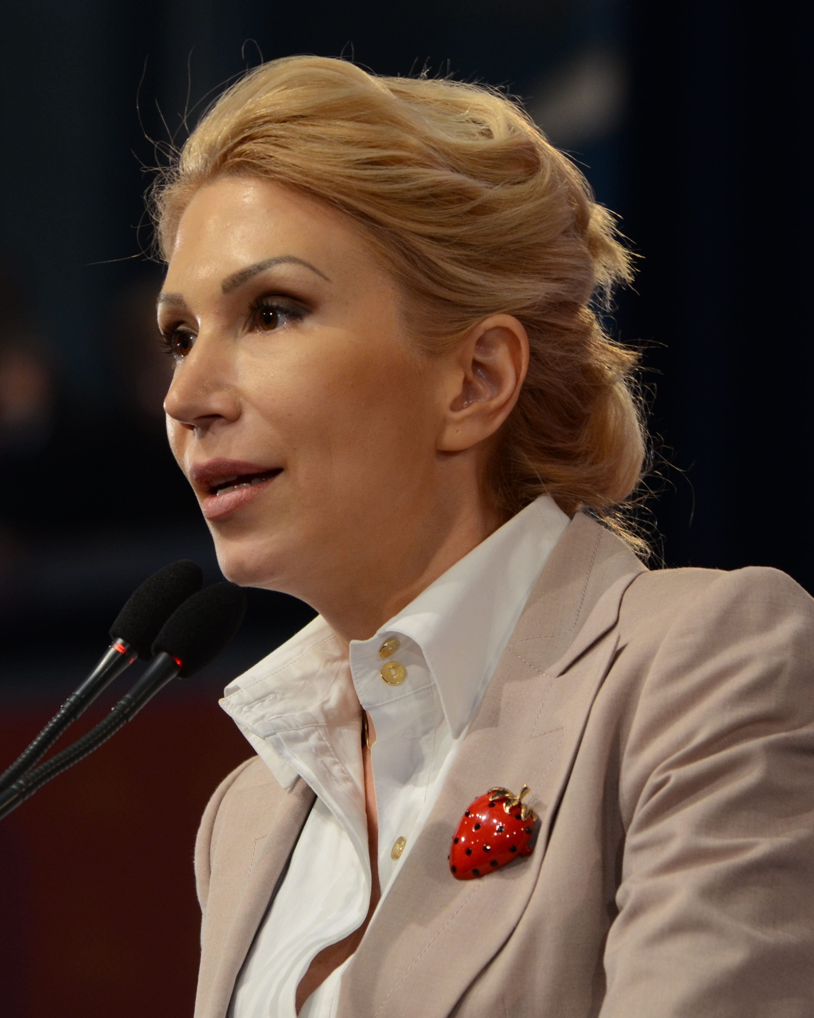 Raluca Turcan (la Convenția națională extraordinară a Partidului Democrat-Liberal, 23 martie 2013)